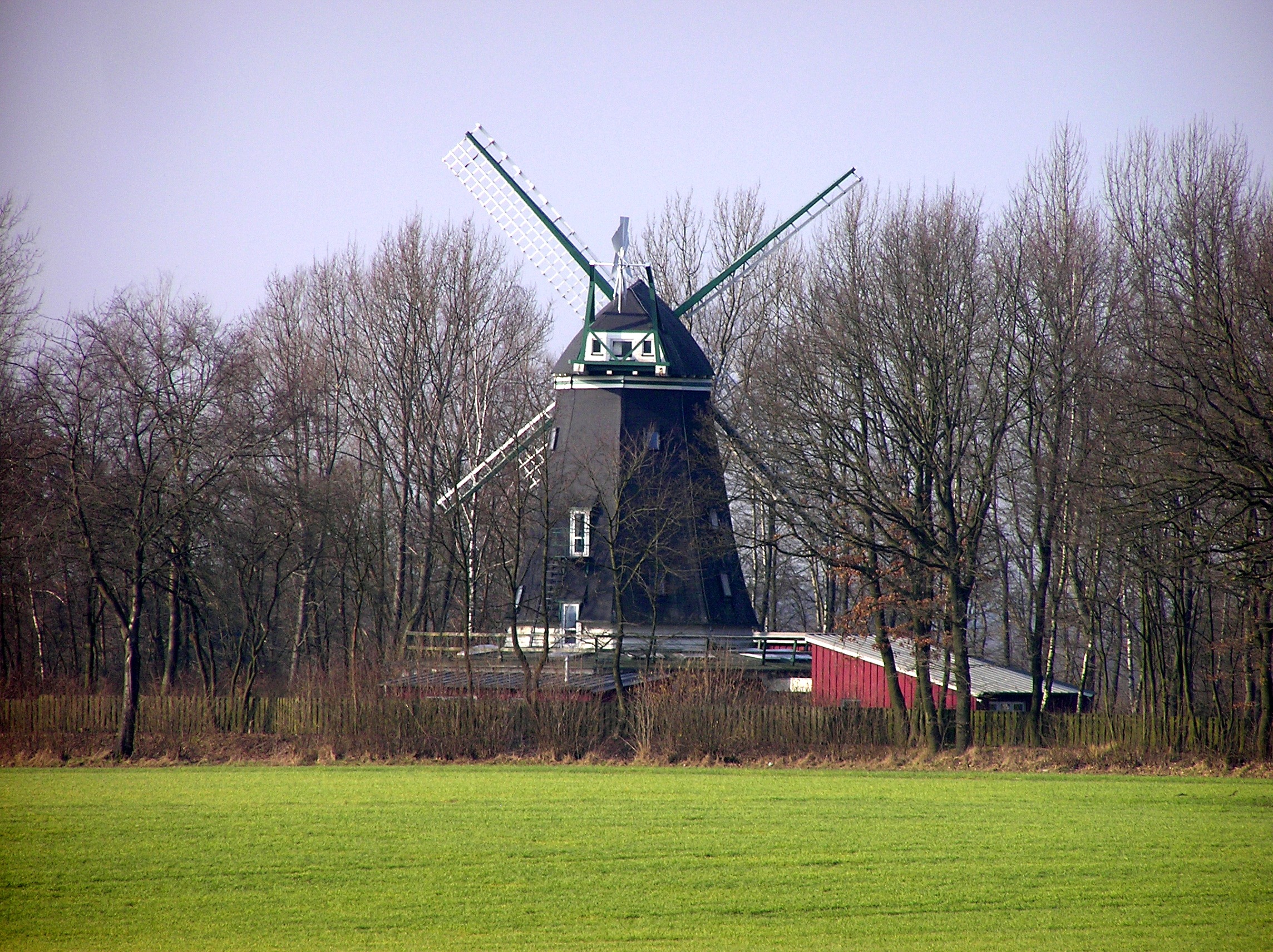 ventmuelejo en Fleischgaffel, norda Germanio - File:Fleischgaffel P2180054.JPG, kontrasto aldonita